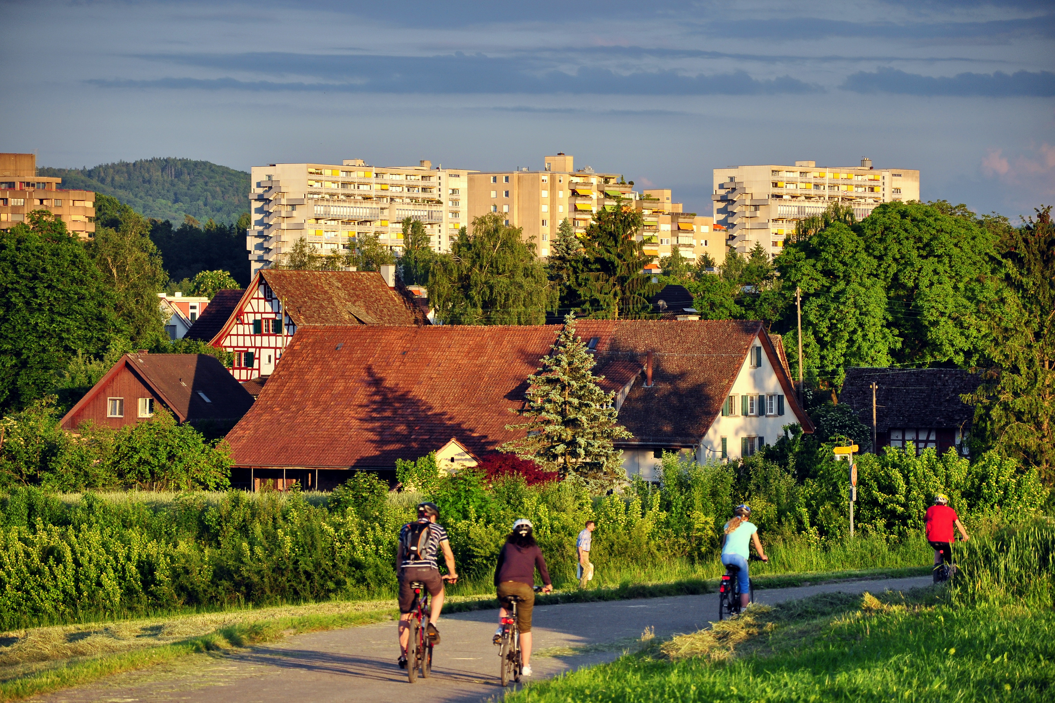 Zürich-Affoltern (Switzerland) as seen from Unteraffoltern